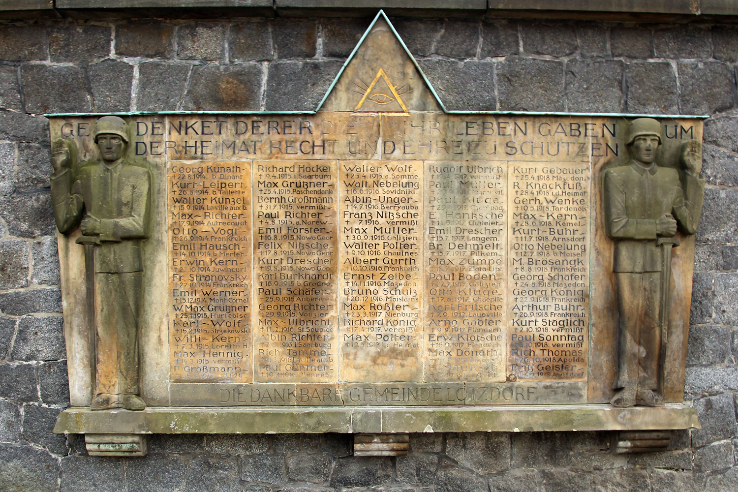 Kriegerdenkmal im Radeberger Ortsteil Lotzdorf